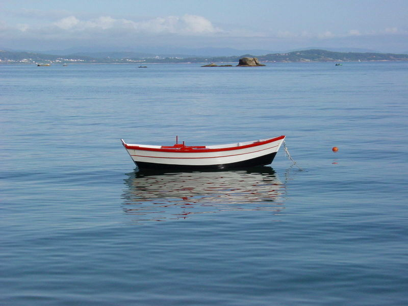 Uma dorna.